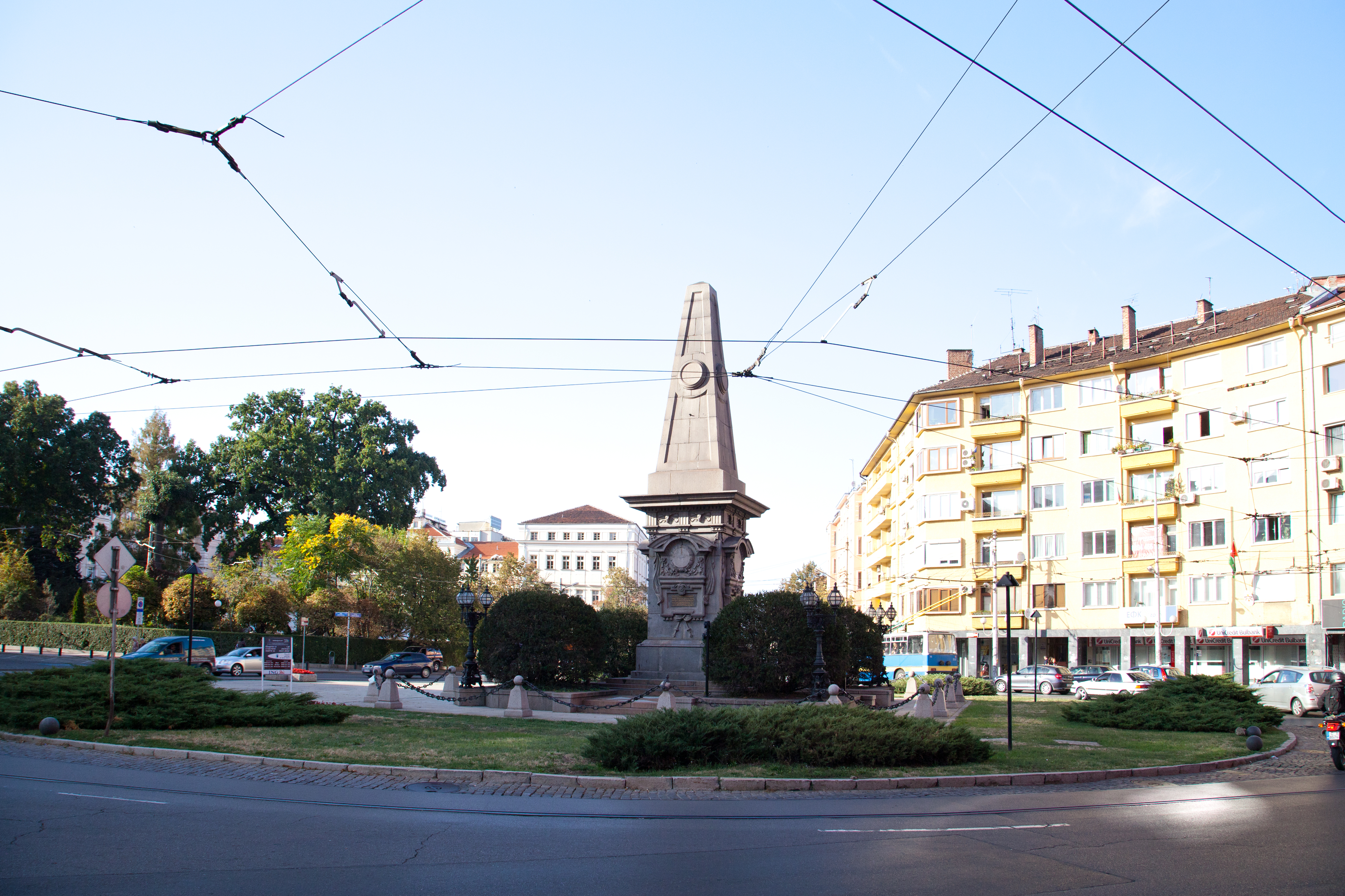 Wassil Lewski Platz in Sofai; mit dem Lewski Denkmal. Deshalb wird der ganz Platz meist nur kurz als Pametnik Lewski (Lewskidenkmal) bezeichnet. Niemand verwedet den offiziellen Namen "Lewski-Platz") .